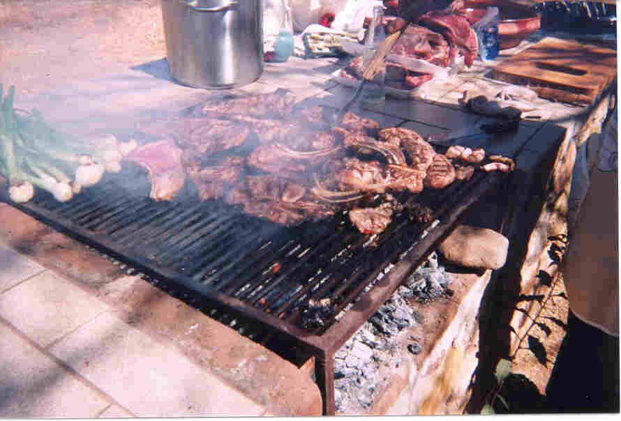 Parrillada de Carne Asada